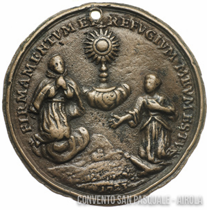 Medaglia posa della prima pietra Chiesa SS. Concezione di Airola - Raffigurante la Contessa D. Antonia Caracciolo e San Pasquale Baylon